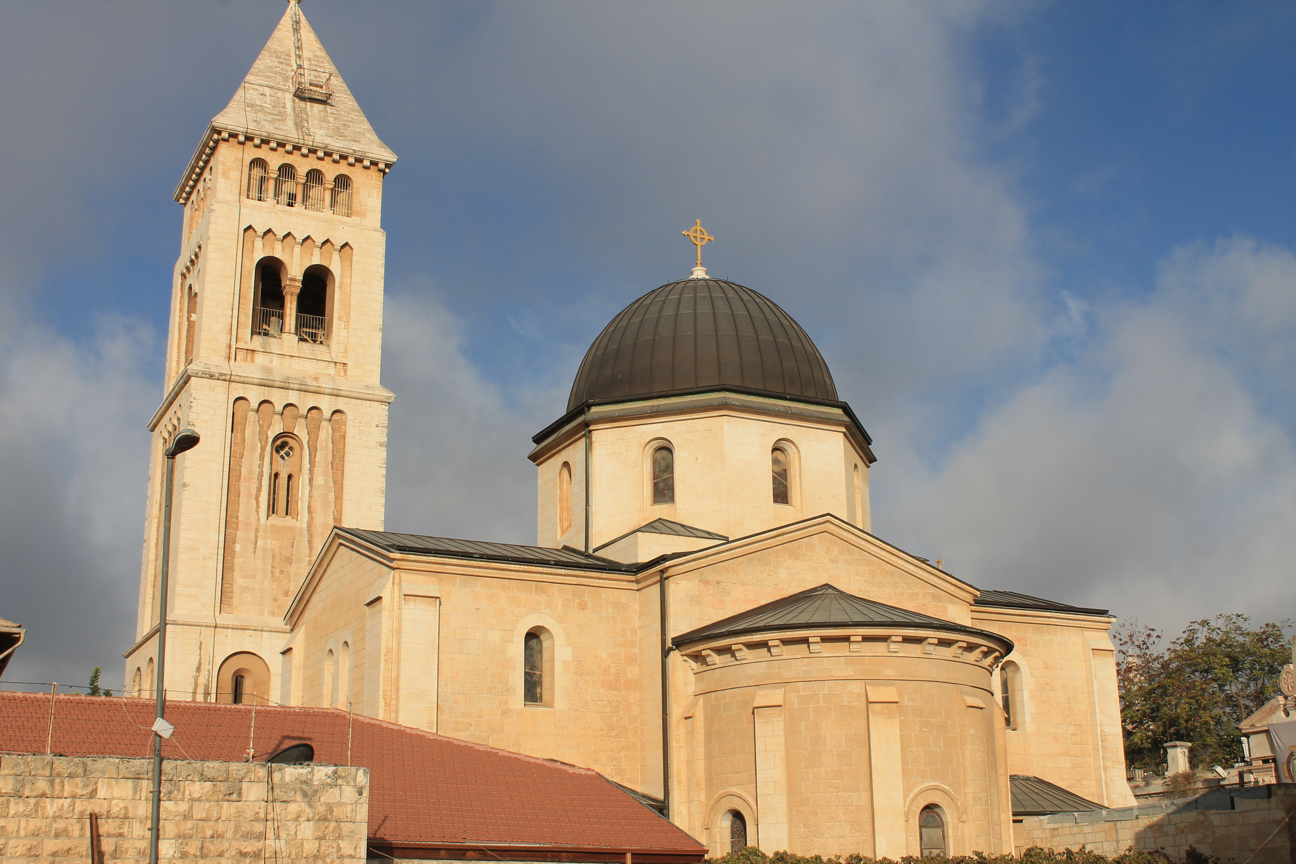 כנסיית הגואל היא כנסייה לותרנית פרוטסטנטית ברובע הנוצרי של העיר העתיקה בירושלים. את אבן הפינה הניח פרידריך השלישי, קיסר גרמניה בשנת 1869 והיא נחנכה כמעט 30 שנה מאוחר יותר בידי בנו, הקיסר וילהלם השני.